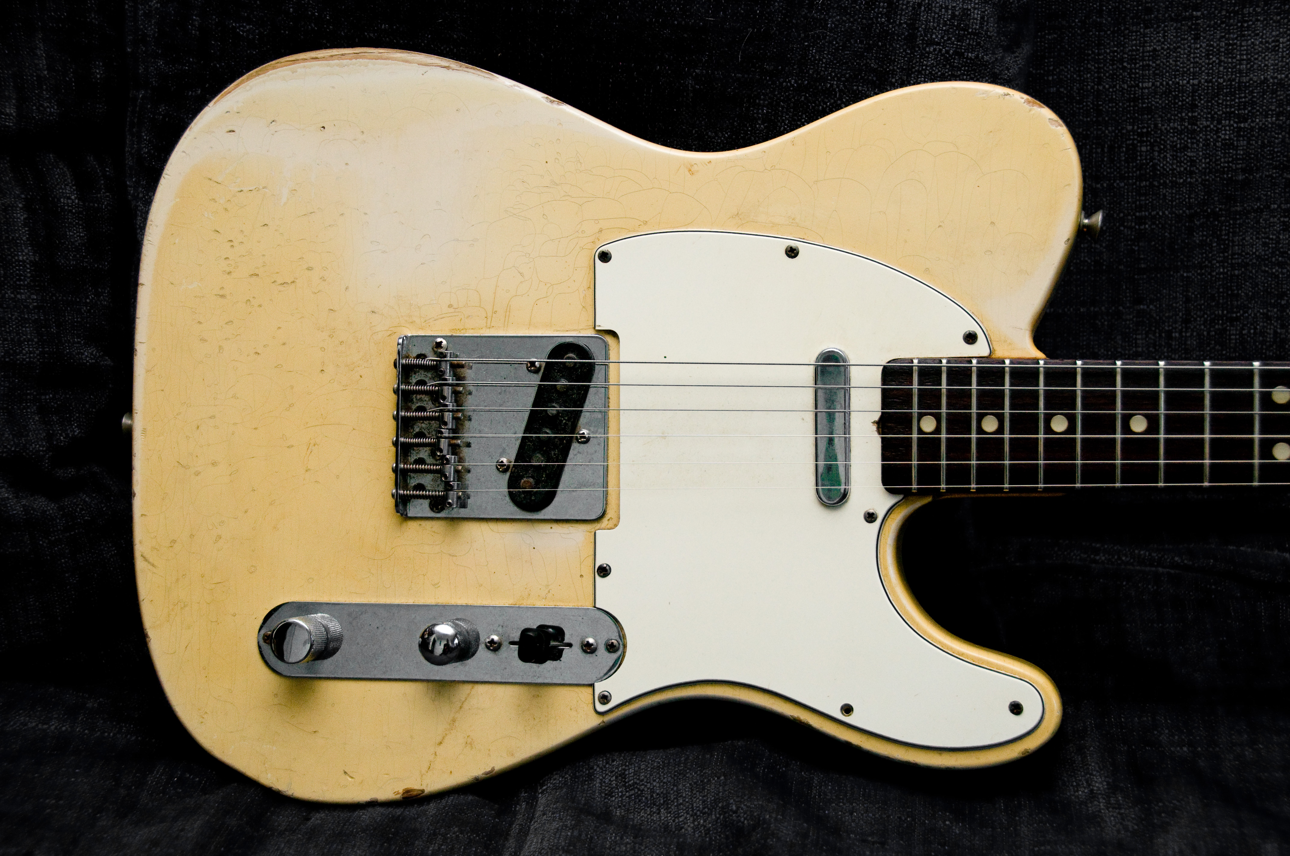 1966 Fender Telecaster (SN159266) body